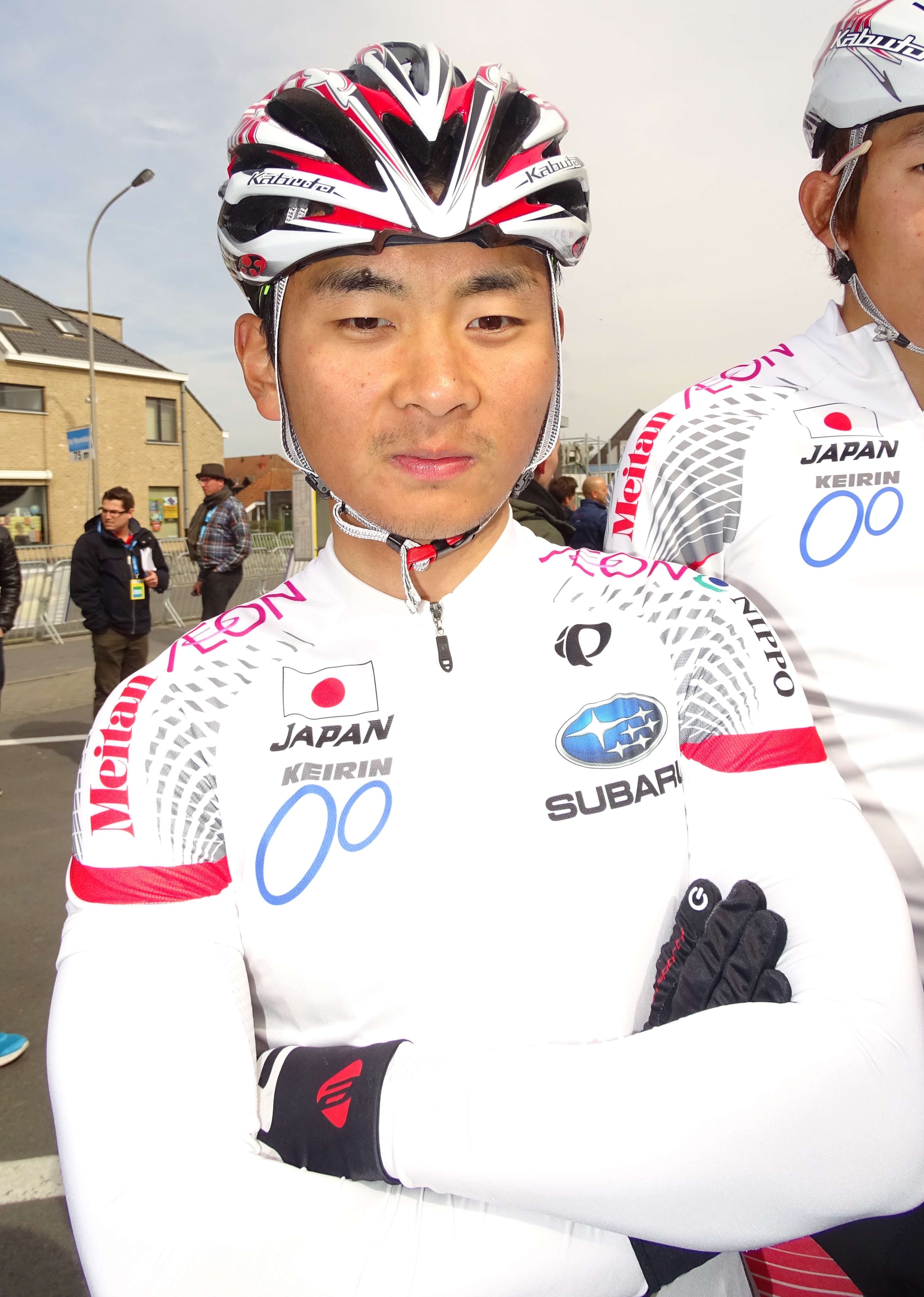 Reportage réalisé le samedi 9 avril à l'occasion du départ et de l'arrivée du Tour des Flandres espoirs 2016 à Audenarde, Belgique.